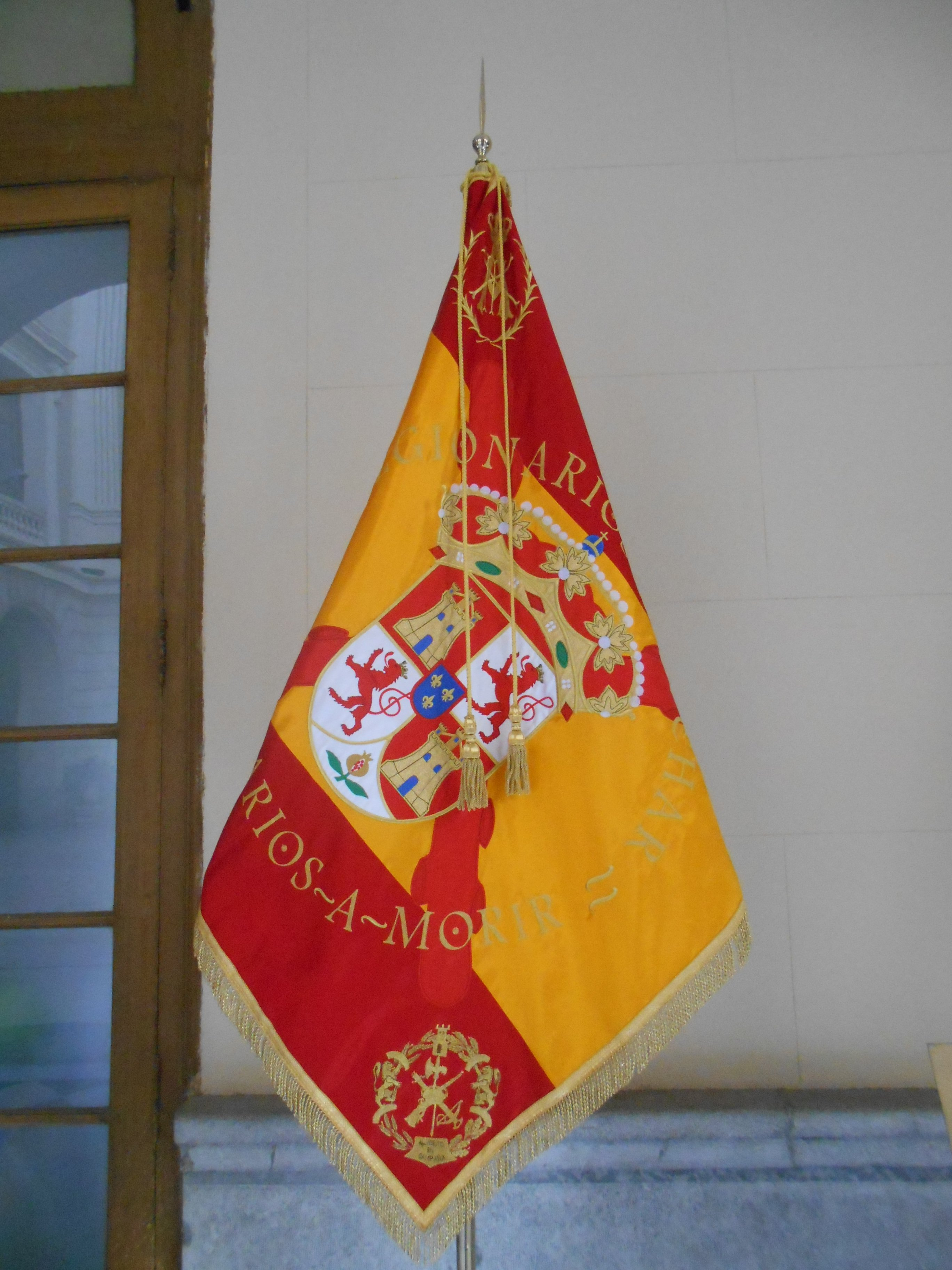 Bandera de la Legión durante el reinado de Alfonso XIII, Gobierno Militar de Barcelona.